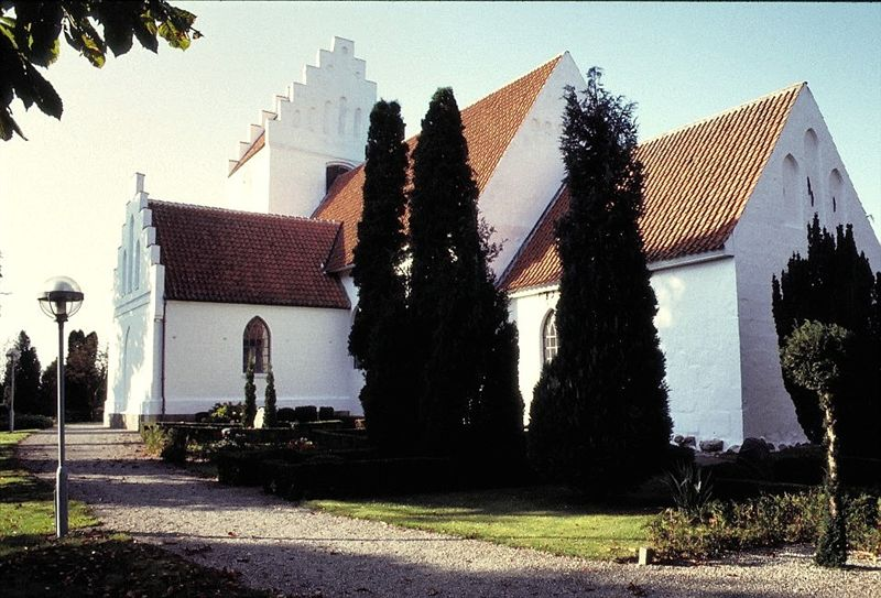 Hunseby Kirke i Danmark. Hunseby kirke